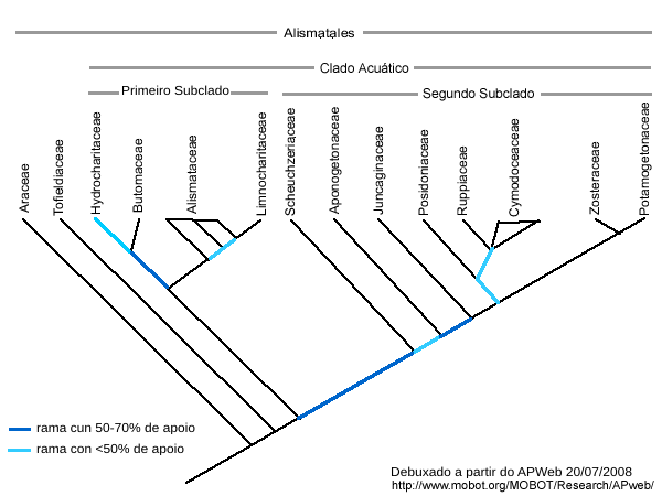 Cladograma de Alismatales